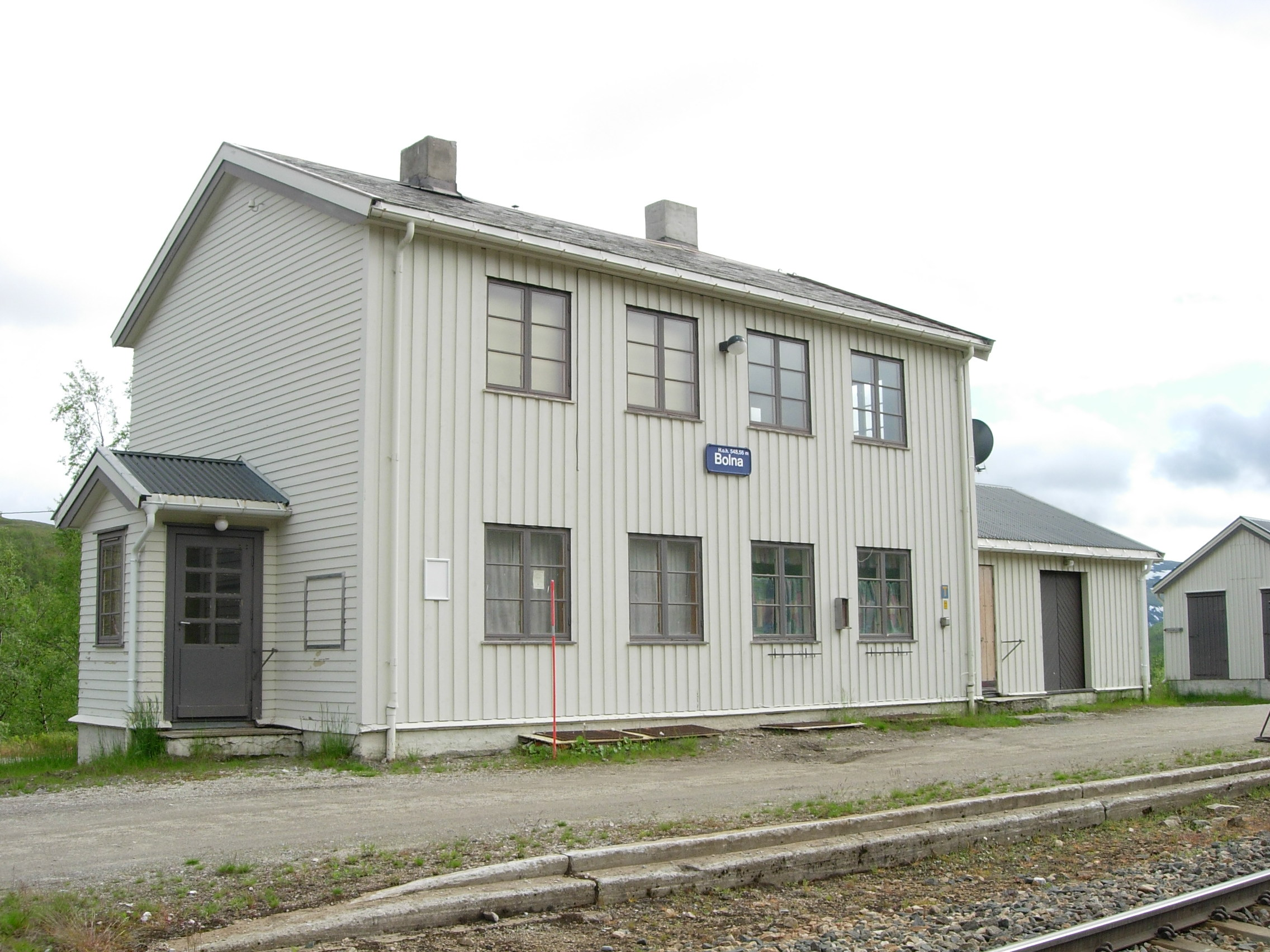 on:Bolna stasjon on Nordlandsbanen, Norway